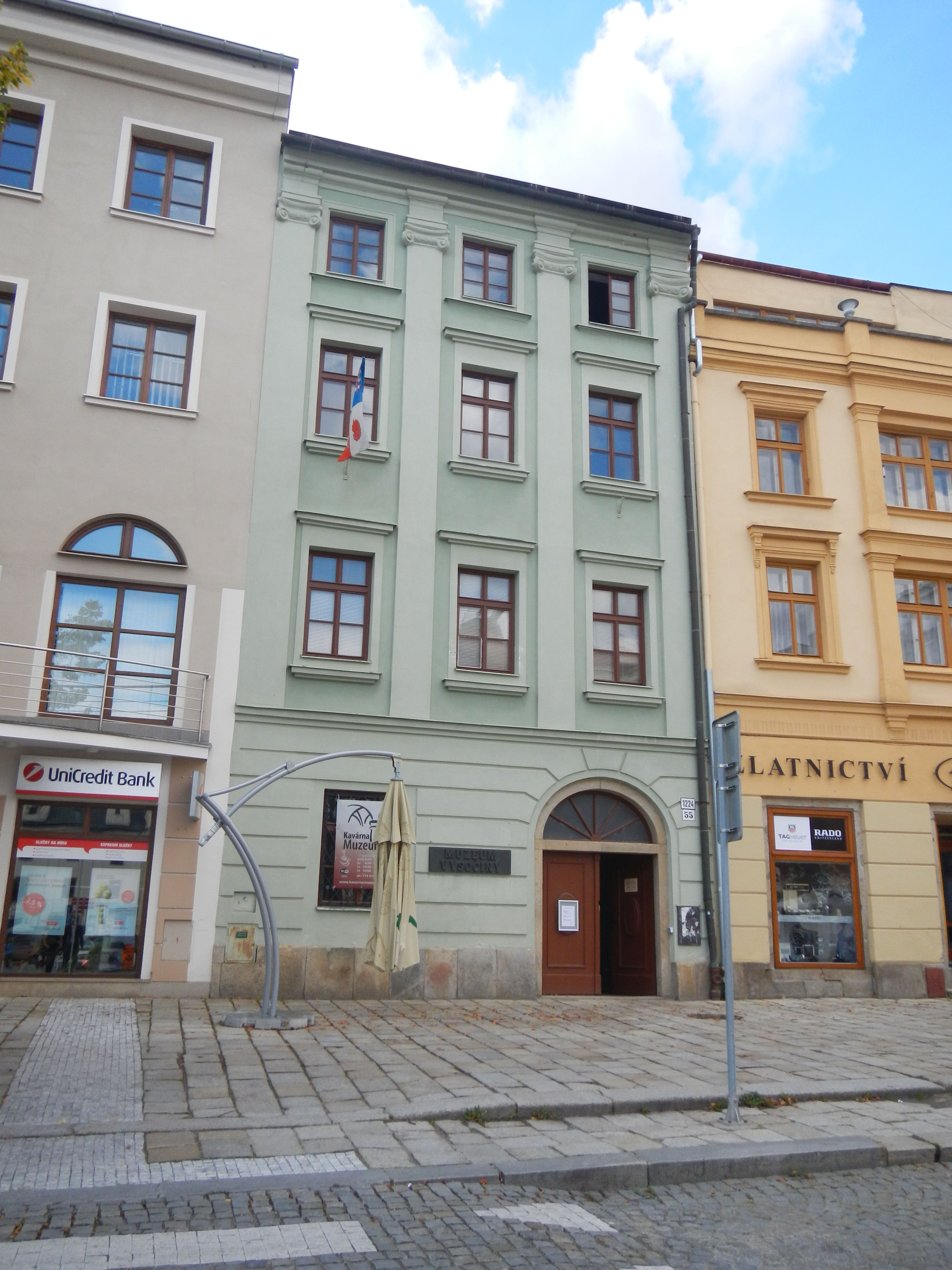 Měšťanský dům (Jihlava), Masarykovo nám. 1224/55, Jihlava